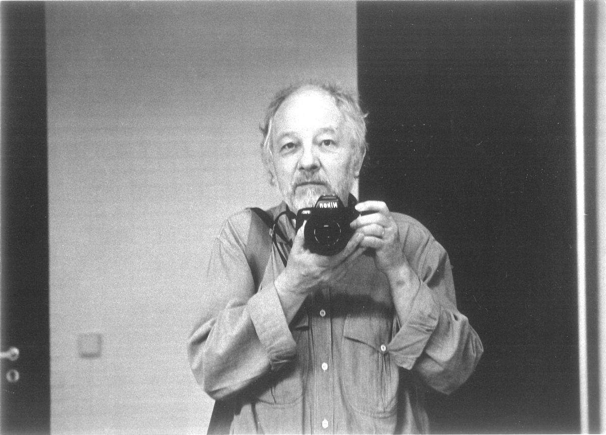 Ein Selbstbildnis des Berliner Hörspiel-Fotografen Werner Bethsold (*1925)